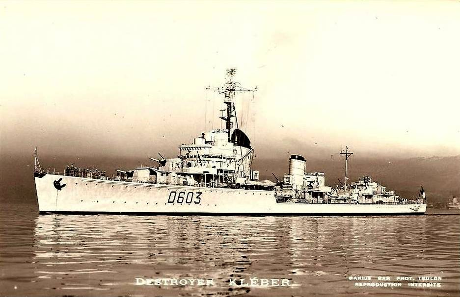 Destroyer français Kléber (1946-1957) ex-destroyer de la Kriegsmarine Z6 Theodor Riedel